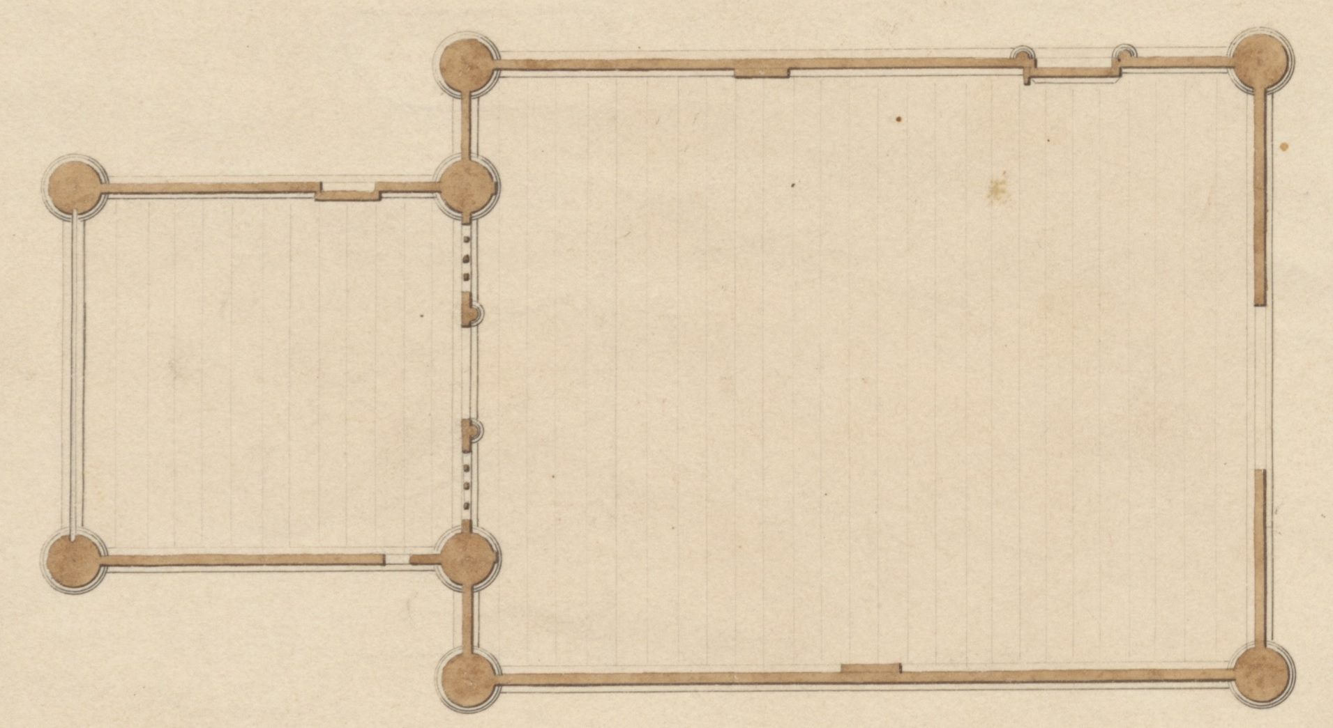 Grunnplan i Vangsnes stavkirke, tegnet ac Georg Bull i 1854. Utsnitt av større bilde.